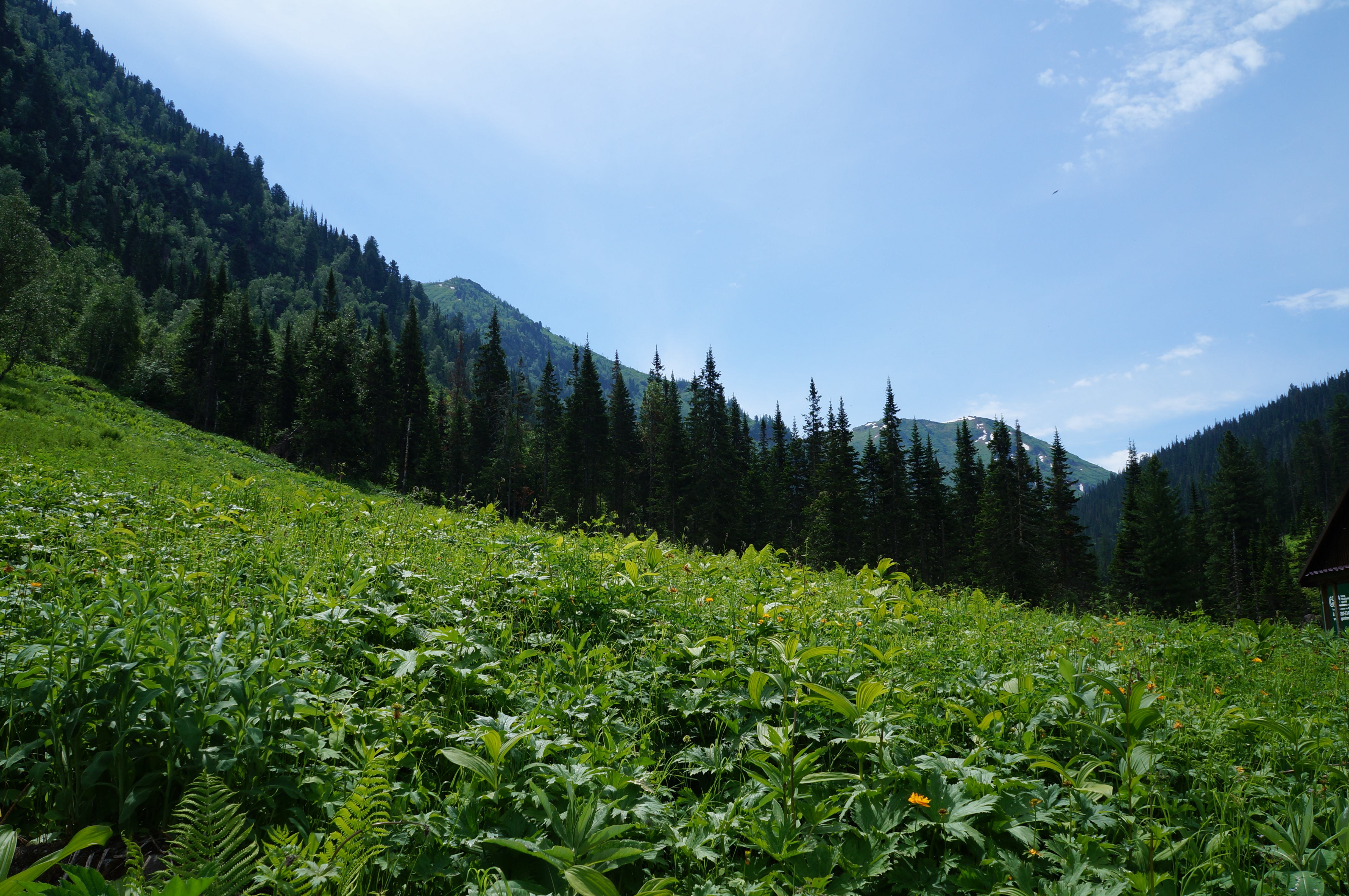 Байкальский заповедник: Джидинский район, Бурятия This image is related to the protected area of Russia number 0300019